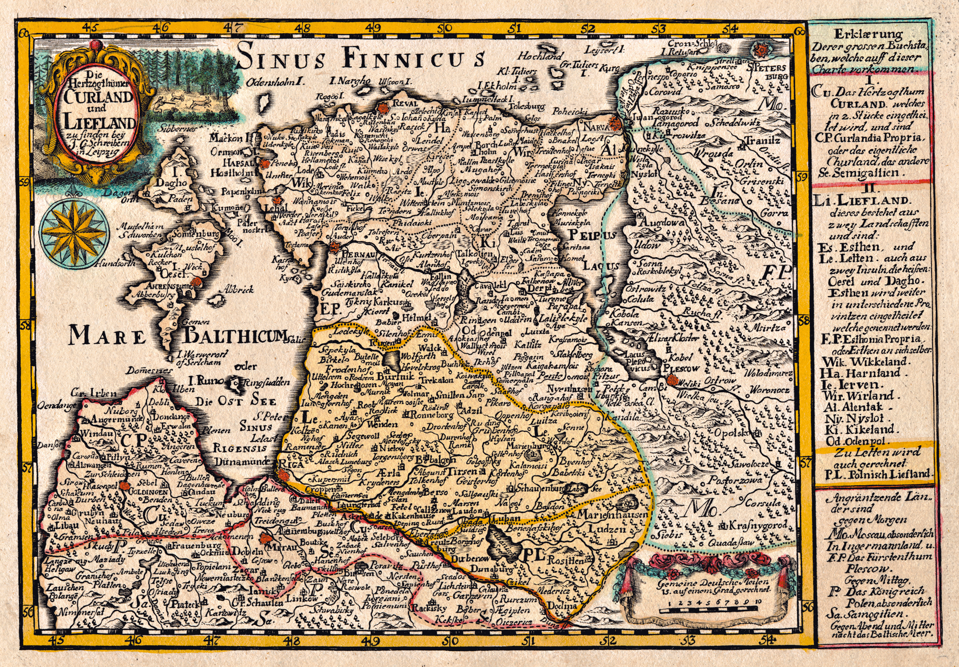 Die Hertzogthümer Curland und Liefland Published in: Atlas Selectus von allen Königreichen und Ländern der Welt zum bequemen Gebrauch in Schulen, auf Reisen und beij dem Lesen der Zeitungen in Leipzig by Johann Christoph and Johann Georg Schreiber. Copper engraving, ca 1:3 000 000, 20 x 16 cm.